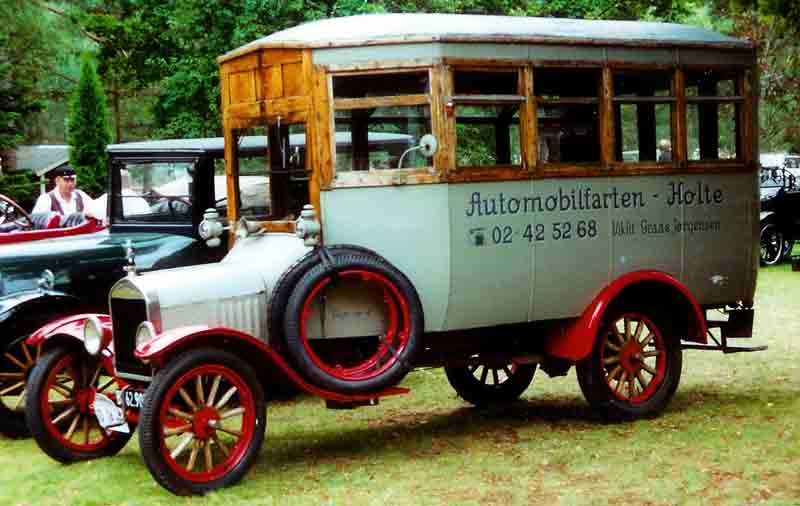 Ford Model TT Bus 1924